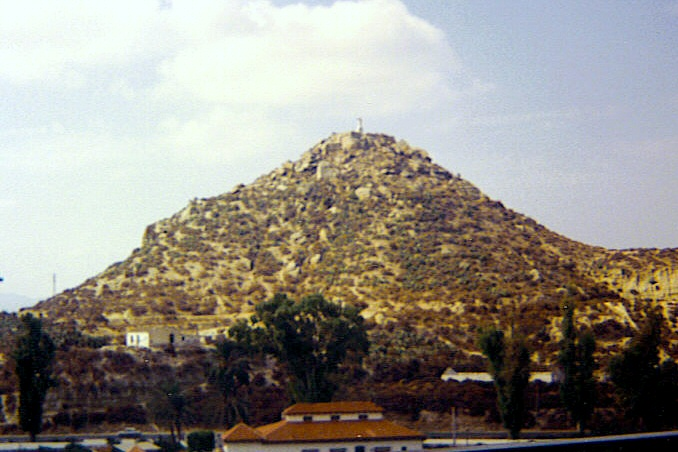 Fotografía tomada desde Vera, antes de las obras para construir un camino hacia el mirado